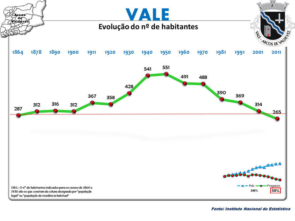 Censos 1864/2011